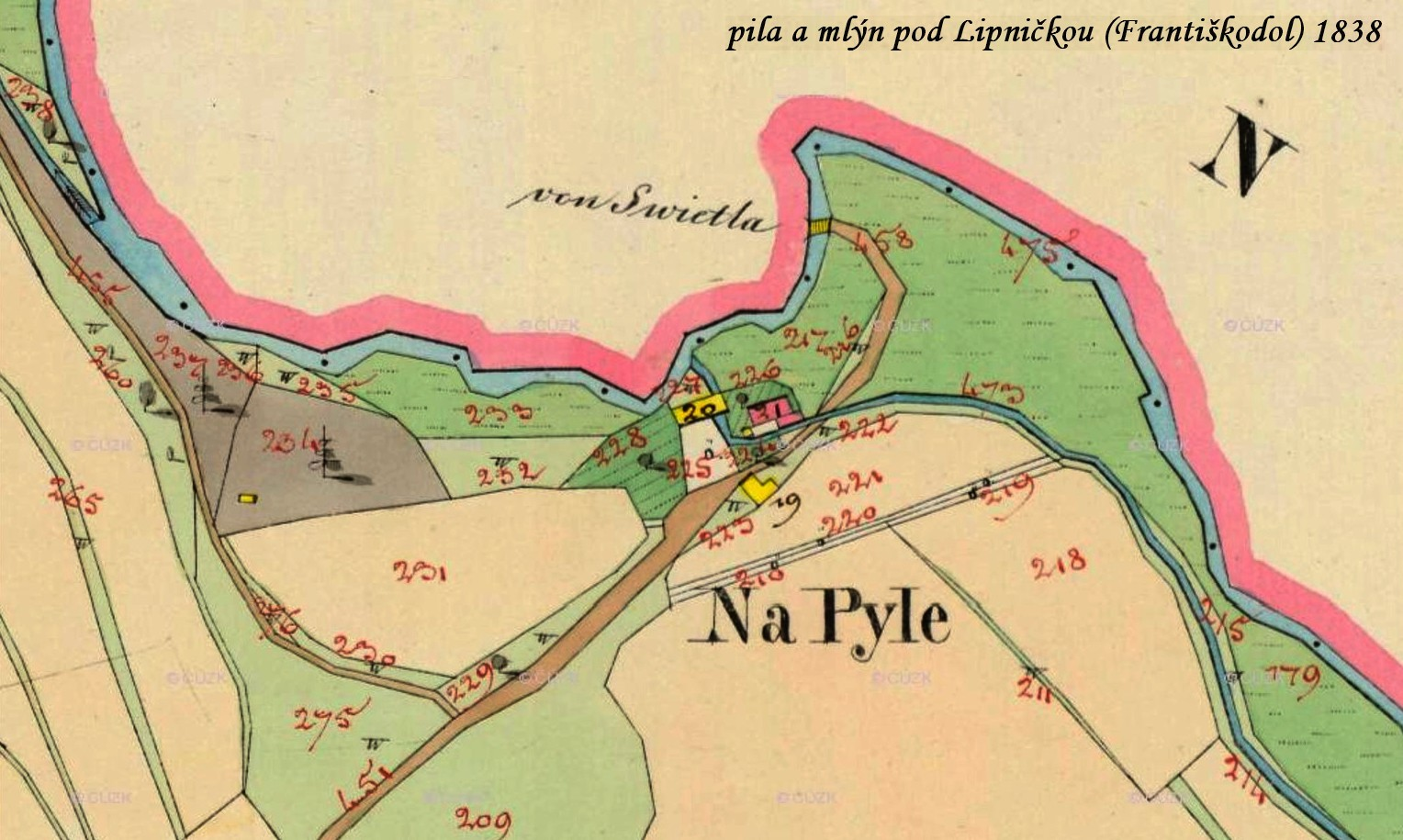 pila a mlýn pod Lipničkou (Františkodol) - část císařského otisku stabilního katastru 1838